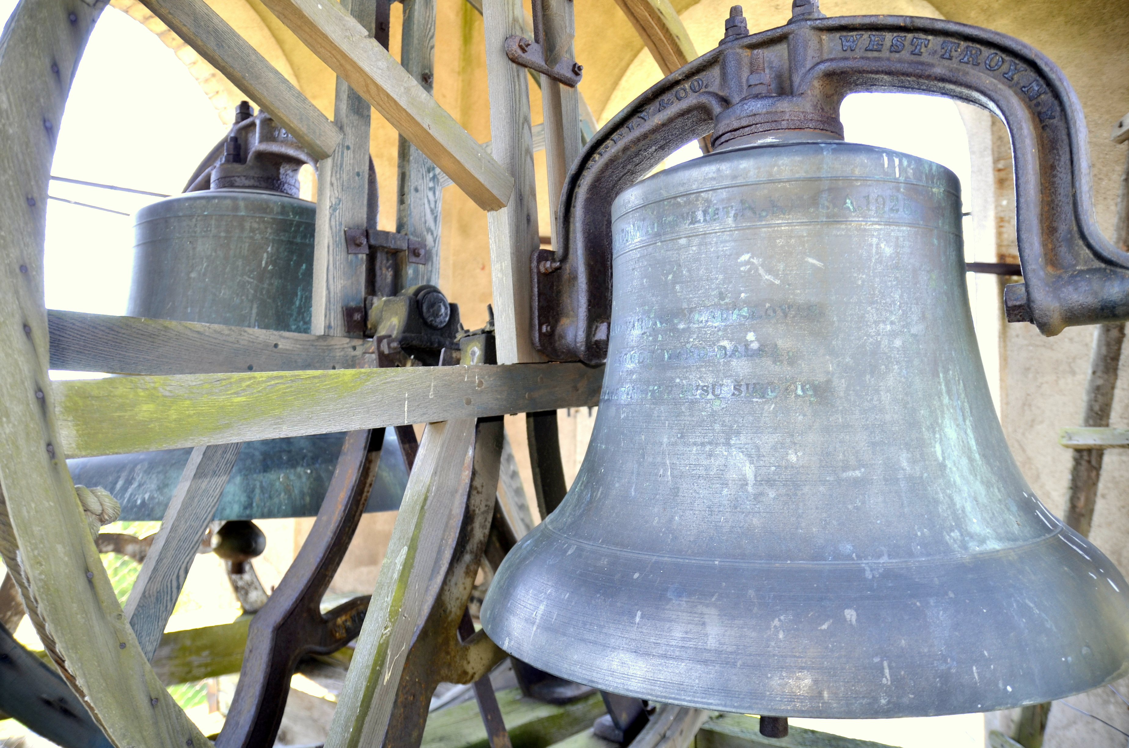 Šilų bažnyčios varpai "Meneely" varpų liejykla, JAV.